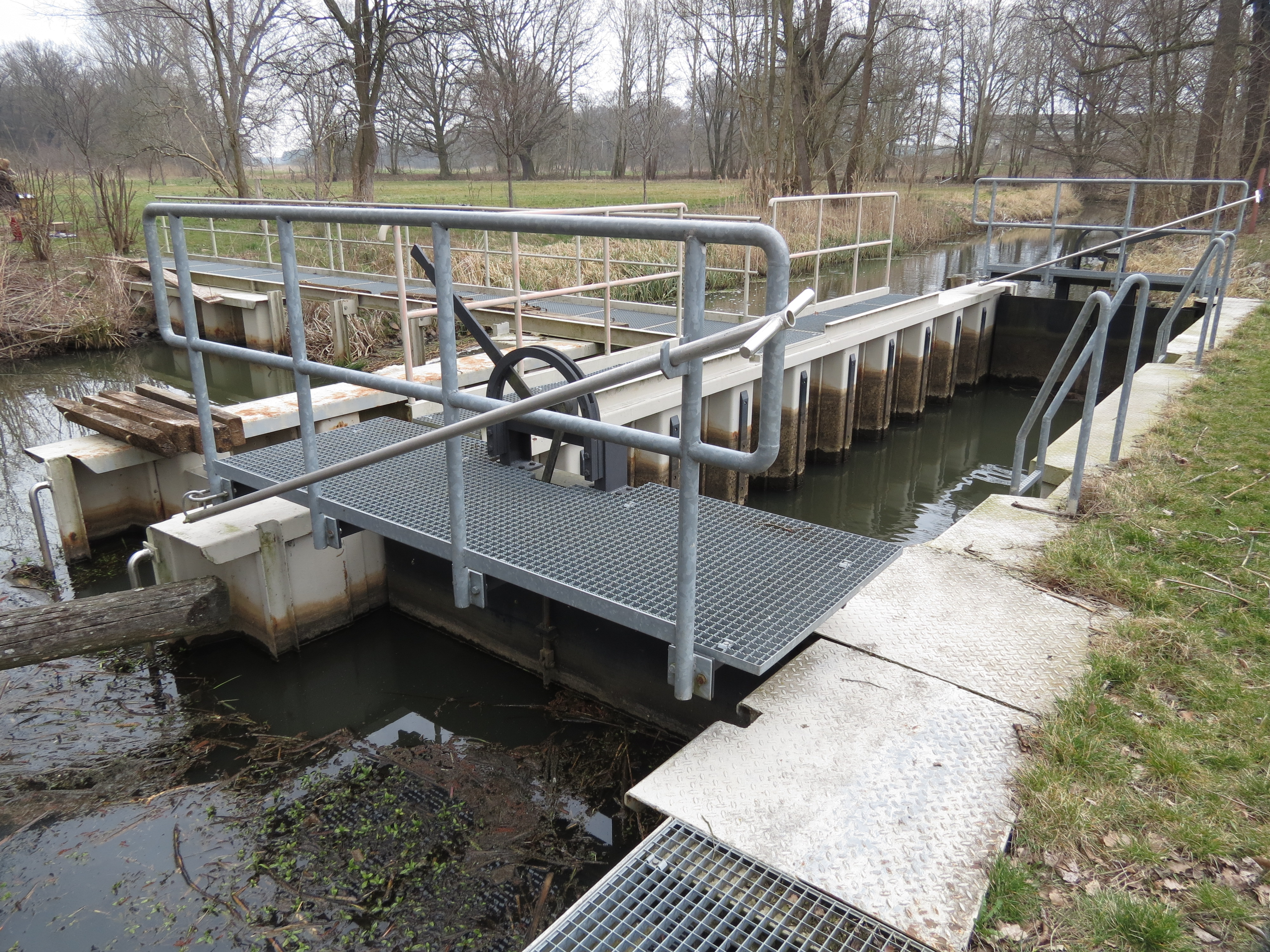 Selbstbedienungsschleuse Pretschen, Gemeinde Märkische Heide, Lkr. Oder-Spree, Brandenburg, Deutschland